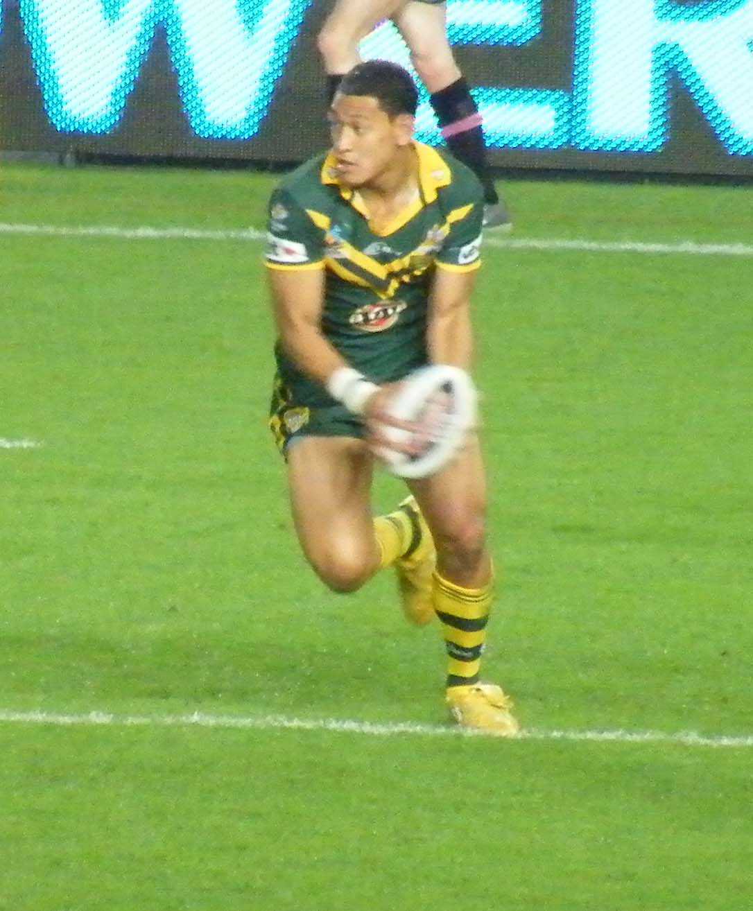 Australian centre Israel Folau. RLWC 2008.